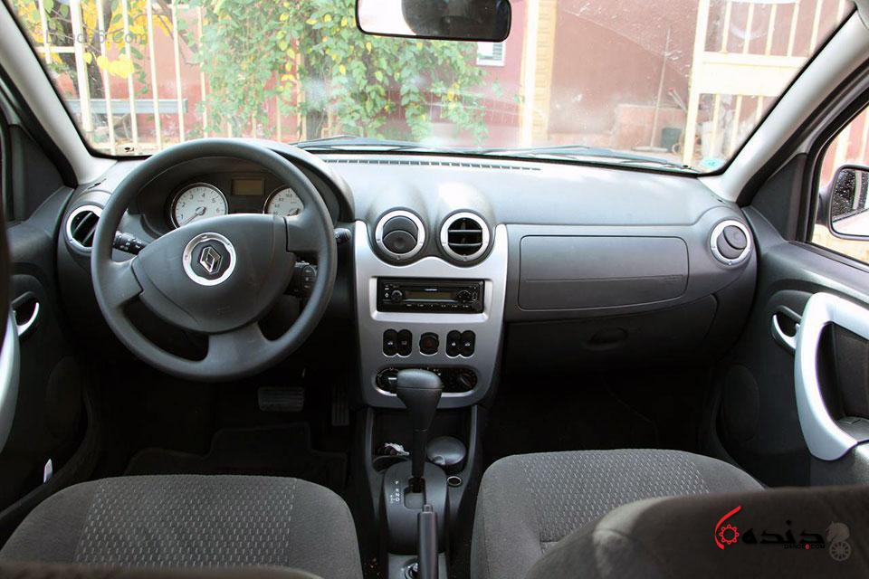 ماشین